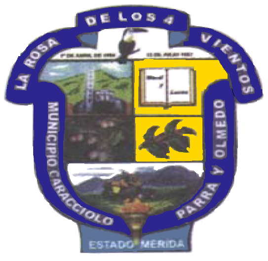 Escudo del municipio Caracciolo Parra Olmedo, Estado Mérida, Venezuela